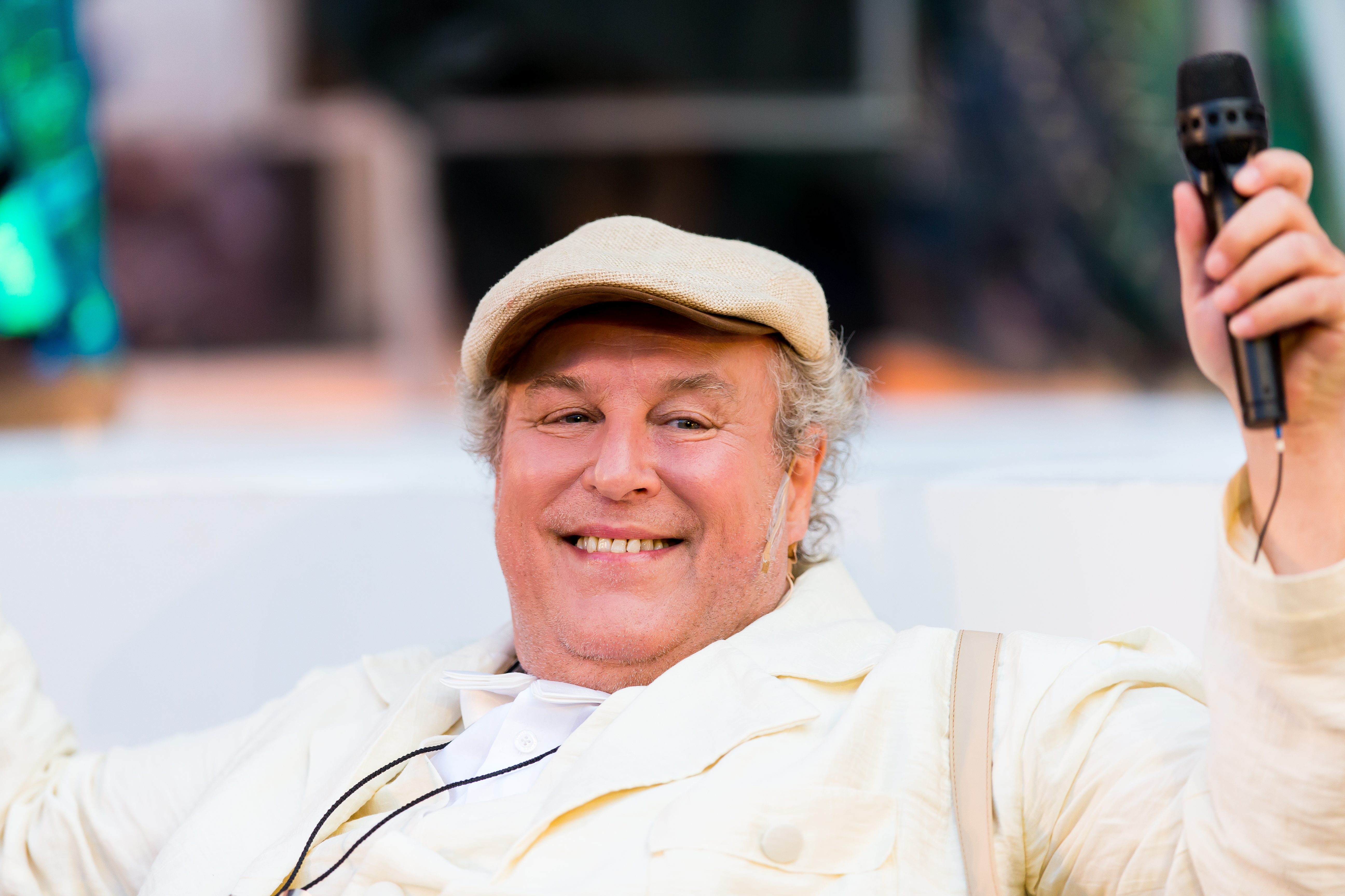 2016: Uraufführung: "GOLD. Der Film der Nibelungen" Regie: Nuran David Calis Autor: Albert Ostermaier Intendant: Nico Hofmann --- Ensemble: Produzent Konstantin Trauer: Uwe Ochsenknecht Regisseur Arsenij Kubik: Vladimir Burlakov Drehbuchautor Charlie P. Weide: Josef Ostendorf Society Reporter Peter Scheumer: Dominic Raacke Kamerafrau "the eye": Anna Rot Setdesignerin "set": Joy Maria Bai Assistentin des Produzenten Carmen: Alexandra Kamp Maskenbildnerin Sueyla Blume : Ayse Bosse die Ältere Kriemhild Karina Bergmann: Katja Weitzenböck die Jüngere Kriemhild Simone Gehel: Constanze Wächter die Ältere Brünhild Lotte Jünger: Michaela Steiger die Jüngere Brünhild Nathalie Aurun: Dennenesch Zoudé Siegfried Mohamad Söder: Ismail Deniz Hagen René Inner: Sascha Göpel Gunther Klaus Castel: Maximilian Laprell Bürgermeister Franz Koppoler: Heiner Lauterbach during Nibelungenfestspiele "GOLD. Der Film der Nibelungen" at Wormser Kaiserdom, Worms, Rheinland Pfalz, Germany on 2016-07-12, Photo: Sven Mandel